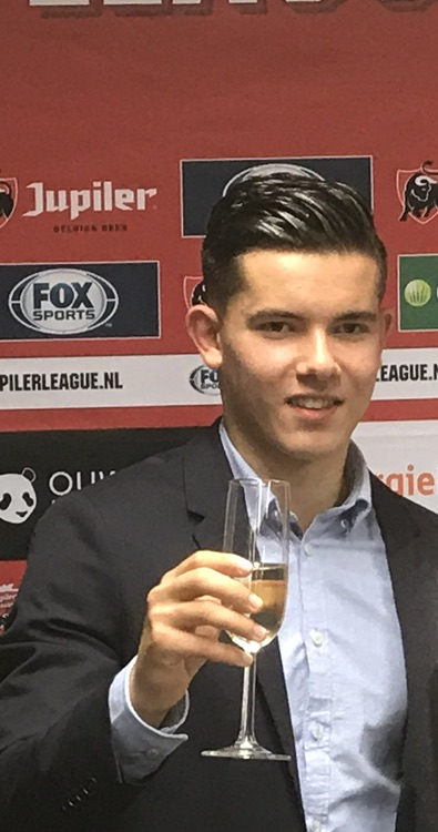 Ferdi Kadioglu (in het midden)